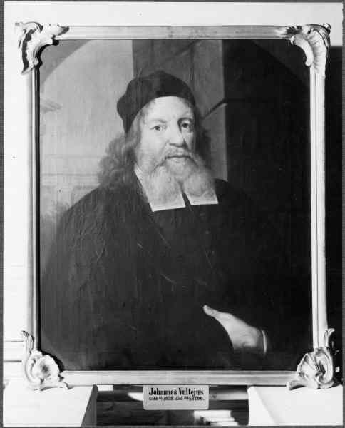 Porträtt föreställande Johannes Vultejus, död 1700. Kategori: (09) Porträtt Porträtt föreställande Johannes Vultejus, död 1700.